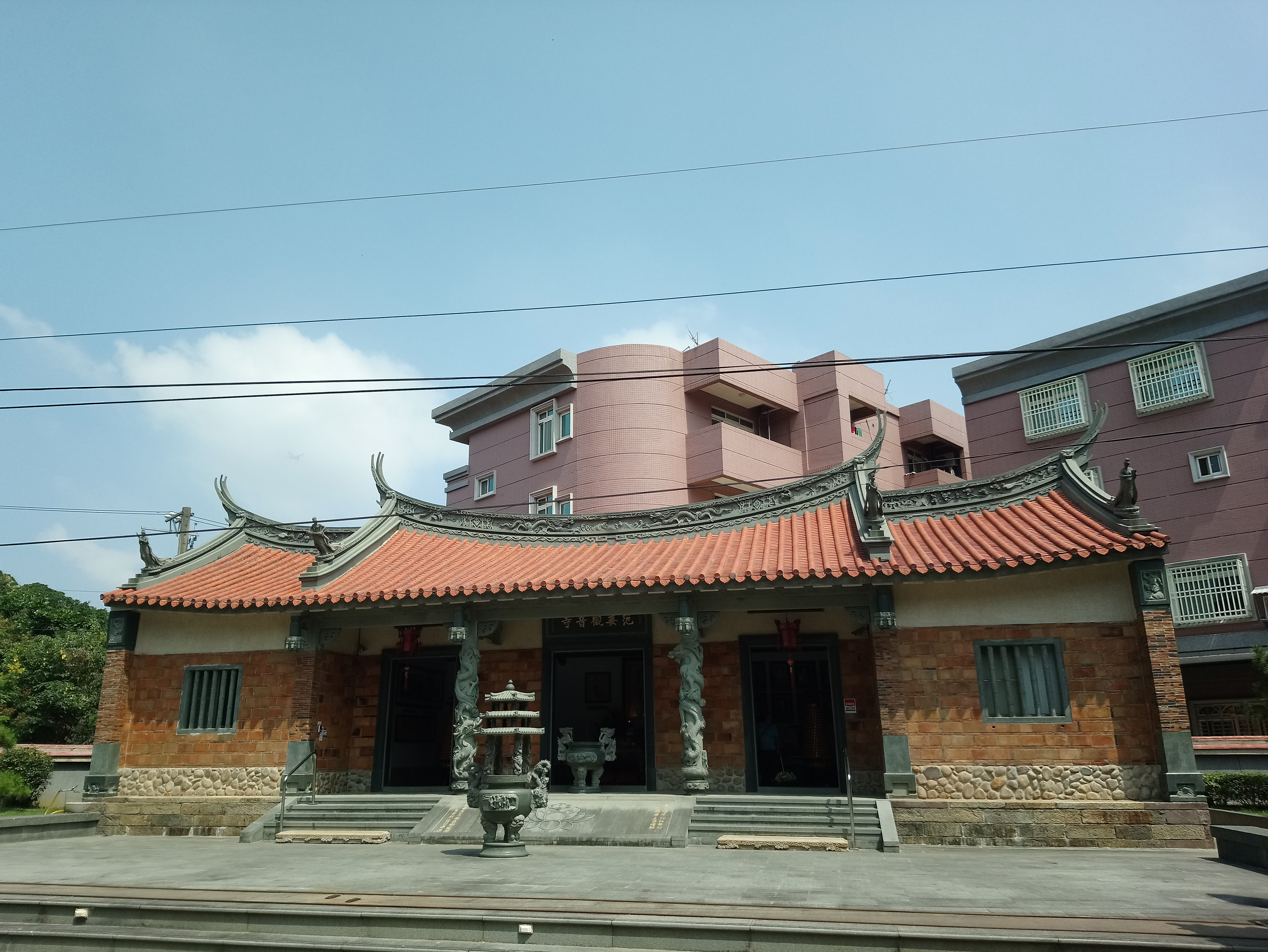 范姜觀音寺,桃園市新屋區新屋次分區新生里